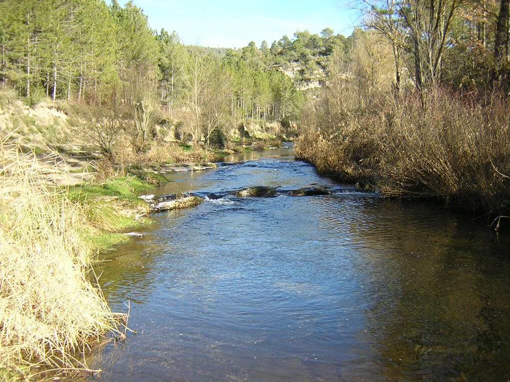 La Golarda (Monistrol de Calders, Moianès)